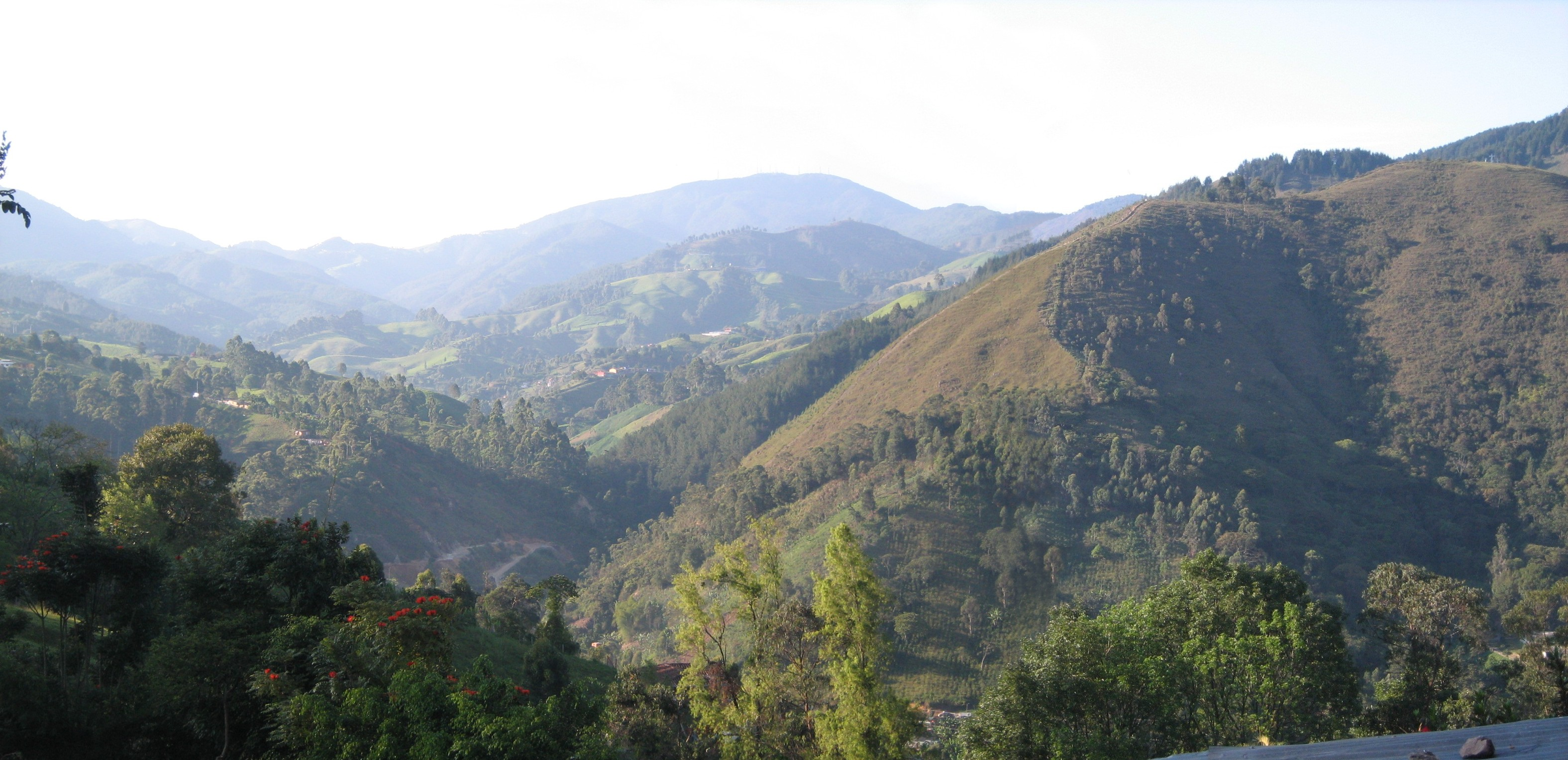 Vista de la geografia del Corregimiento de San Antonio de Prado, Medellín, Colombia.